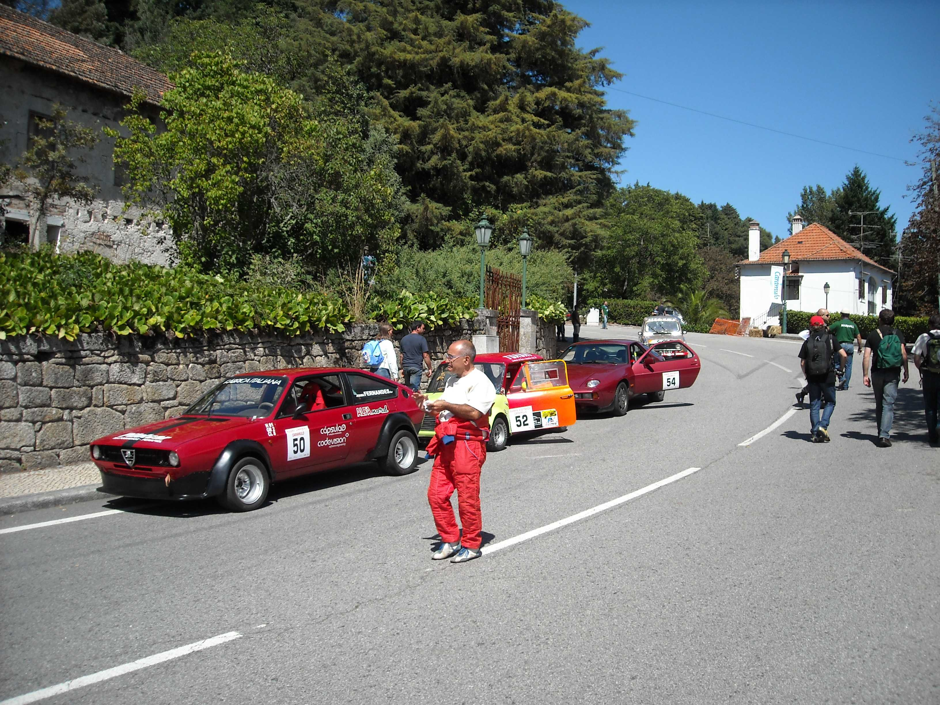 Motorshow, Caramulo, autos clásicos, septiembre 2008